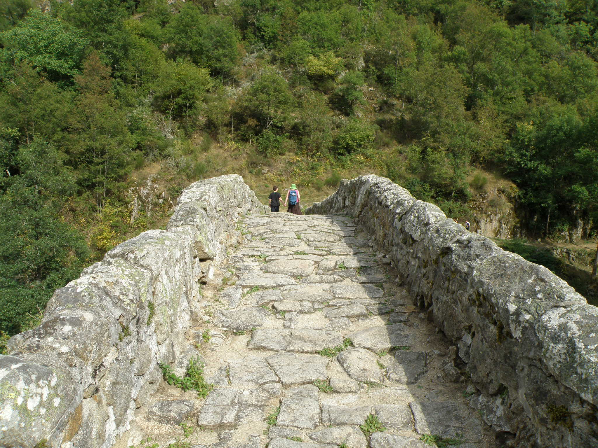 Hameau de Chalencon, appartenant à la comm. de Saint-André-de-Chalencon, dép. de la Haute-Loire, France (région Auvergne). Pont du Diable sur la rivière l'Ance. Largeur totale du pont (avec les parapets): 2,8 m; largeur de la voie: 2m.